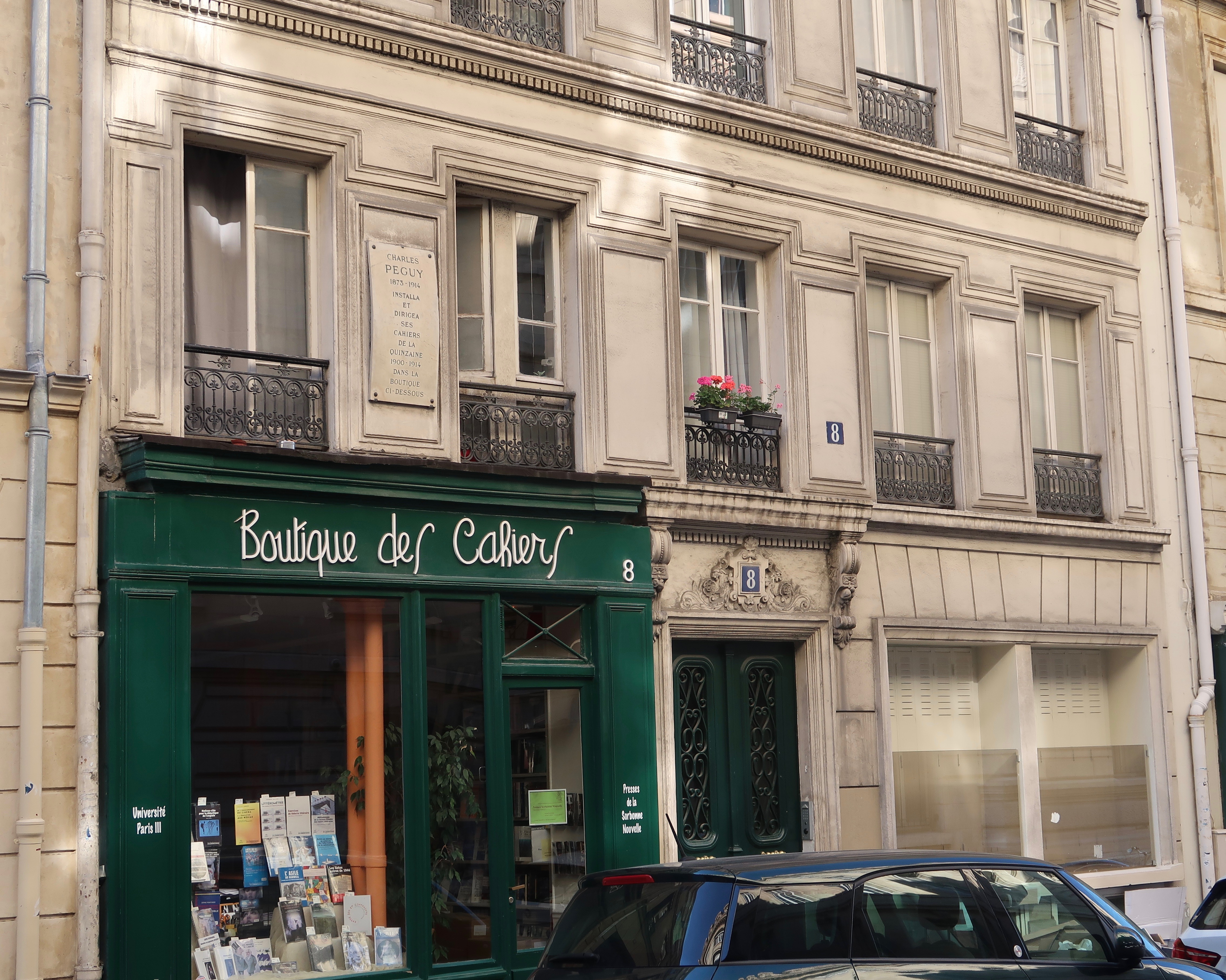 Librairie, ancien siège des Cahiers de la Quinzaine, 8 rue de la Sorbonne (Paris, 5e).